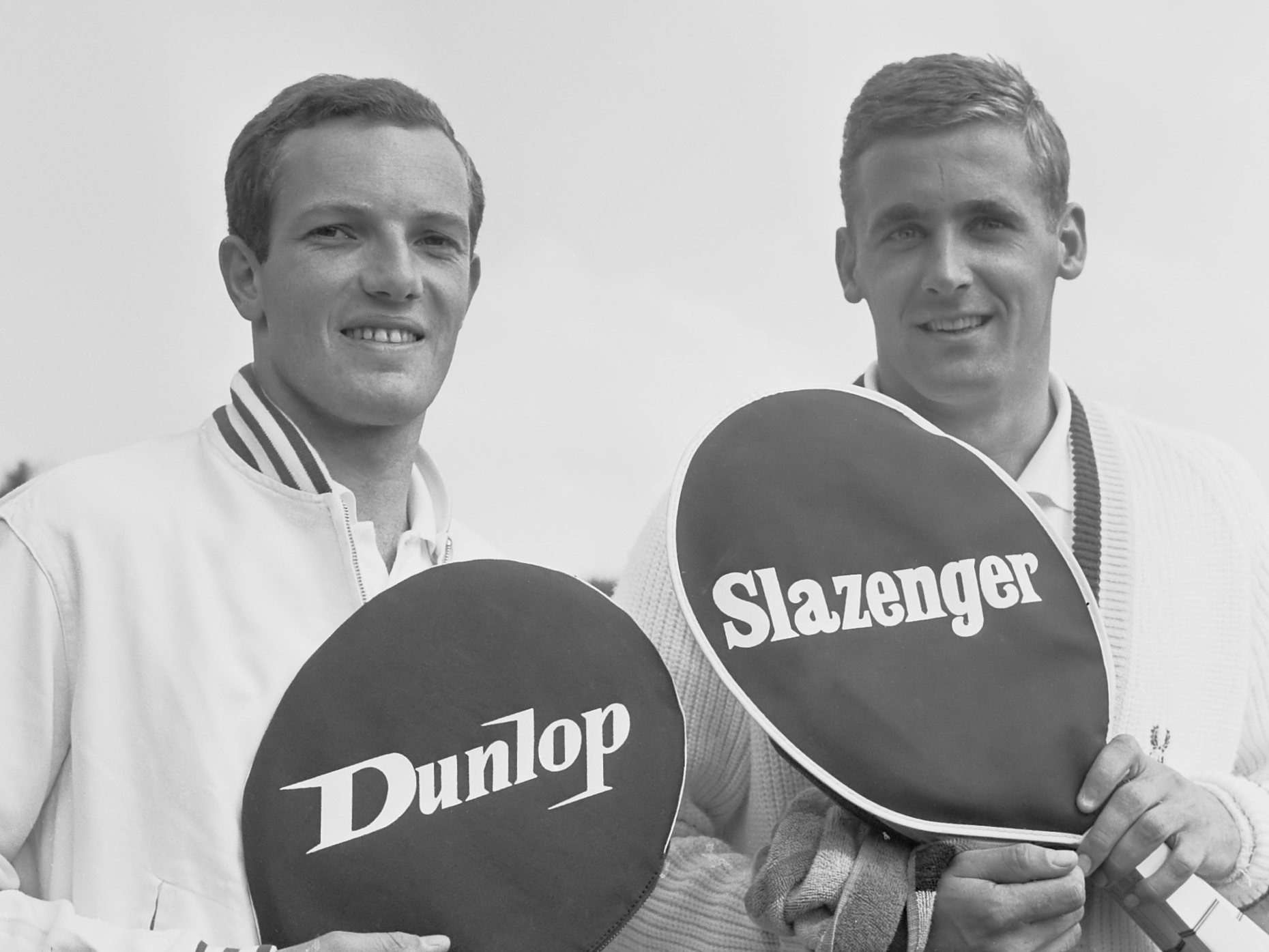 Tenniskampioenschappen Nederland, Tom Okker (l) en Jan Hajer (r) 16 augustus 1964